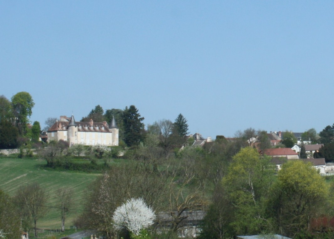 Le village et le château